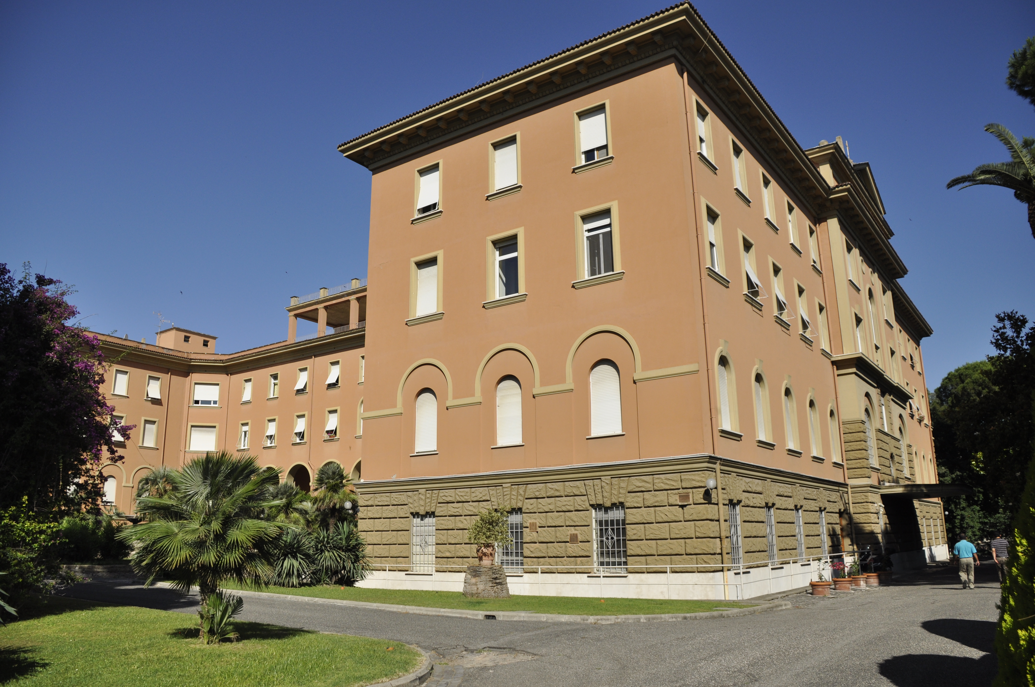 Collegio del Verbo Divino, sede do governo-geral dos Missionários do Verbo Divino